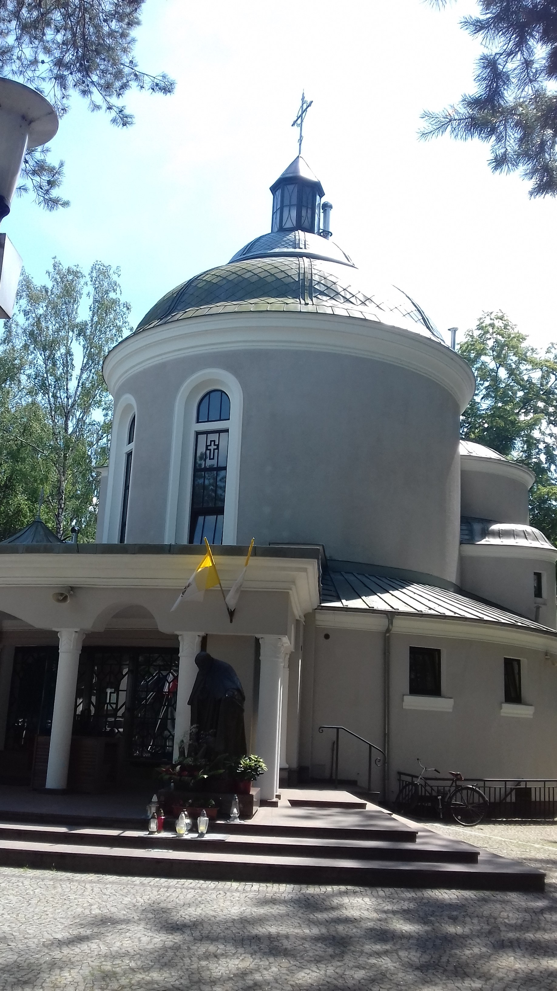 Komorów (gm. Michałowice, pow. Pruszków) - kościół Narodzenia NMP